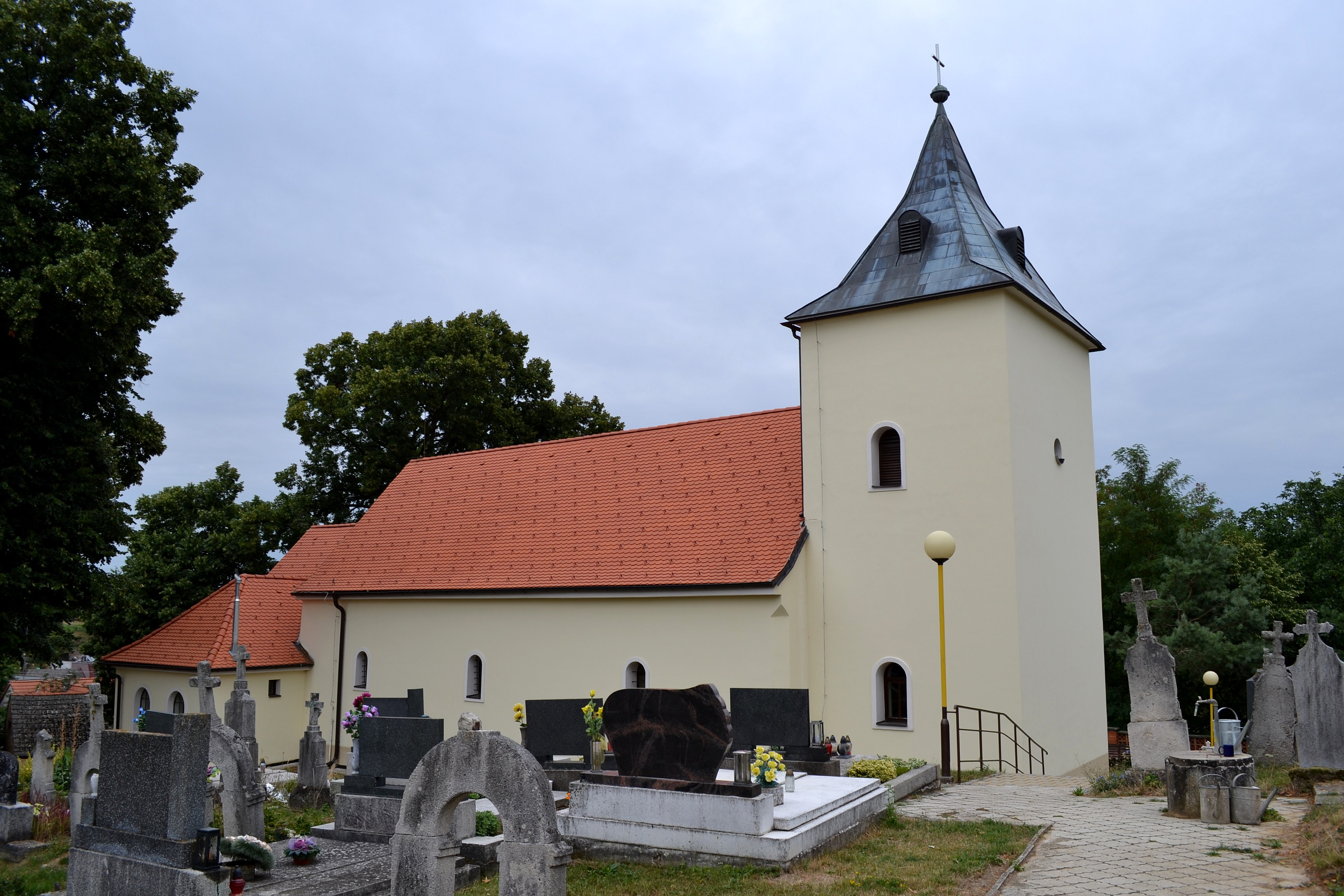 Šterusy (okr. Piešťany), Kostol svätej Márie Magdalény; pohľad zo seveu